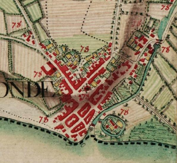 Stadsplan van Rupelmonde uit 1770-1777